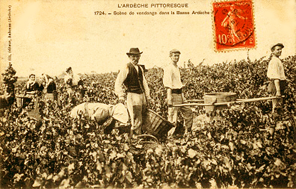 1908 vendanges dans le Vivarais